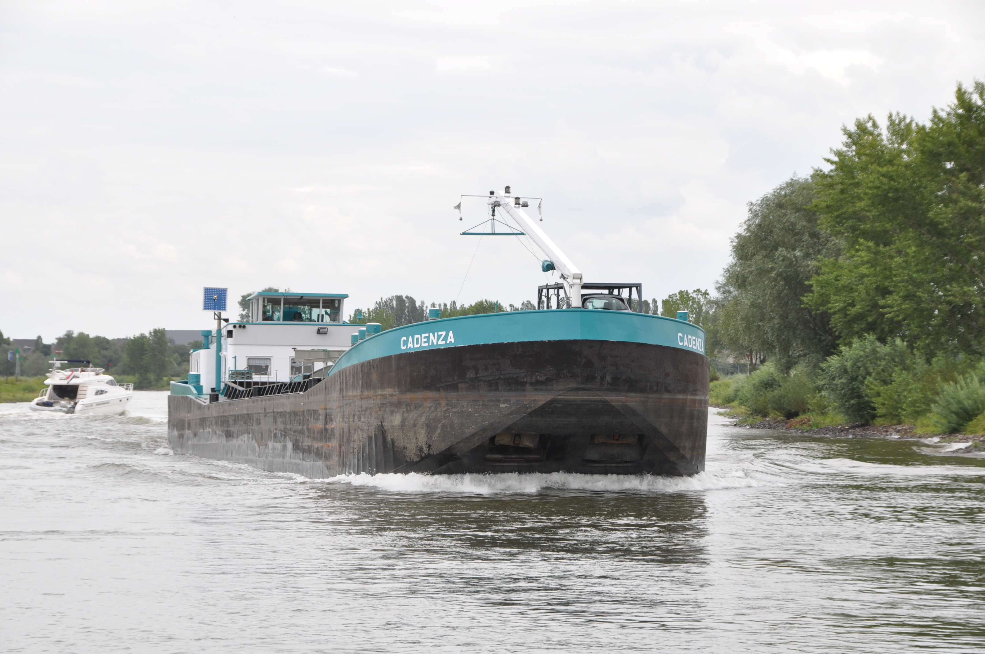 De CADENZA in de afvaart op de IJssel